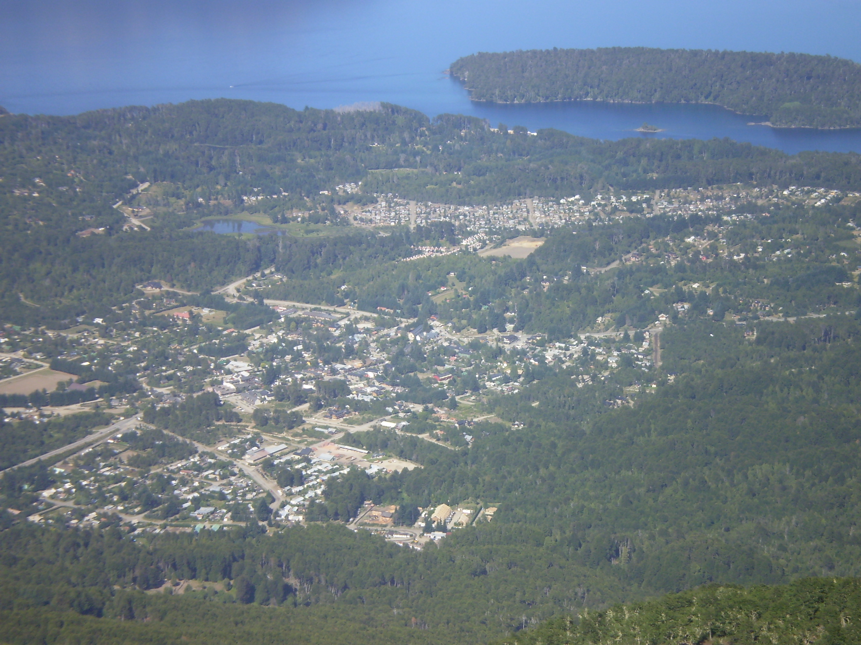 Villa La Angostura, Neuquén, Argentina (vista desde la cumbre del cerro Bayo)